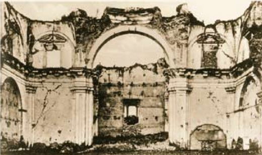 Ruinas del interior del temple y convent de la Compañía de Jesús, Antigua Guatemala en 1900.